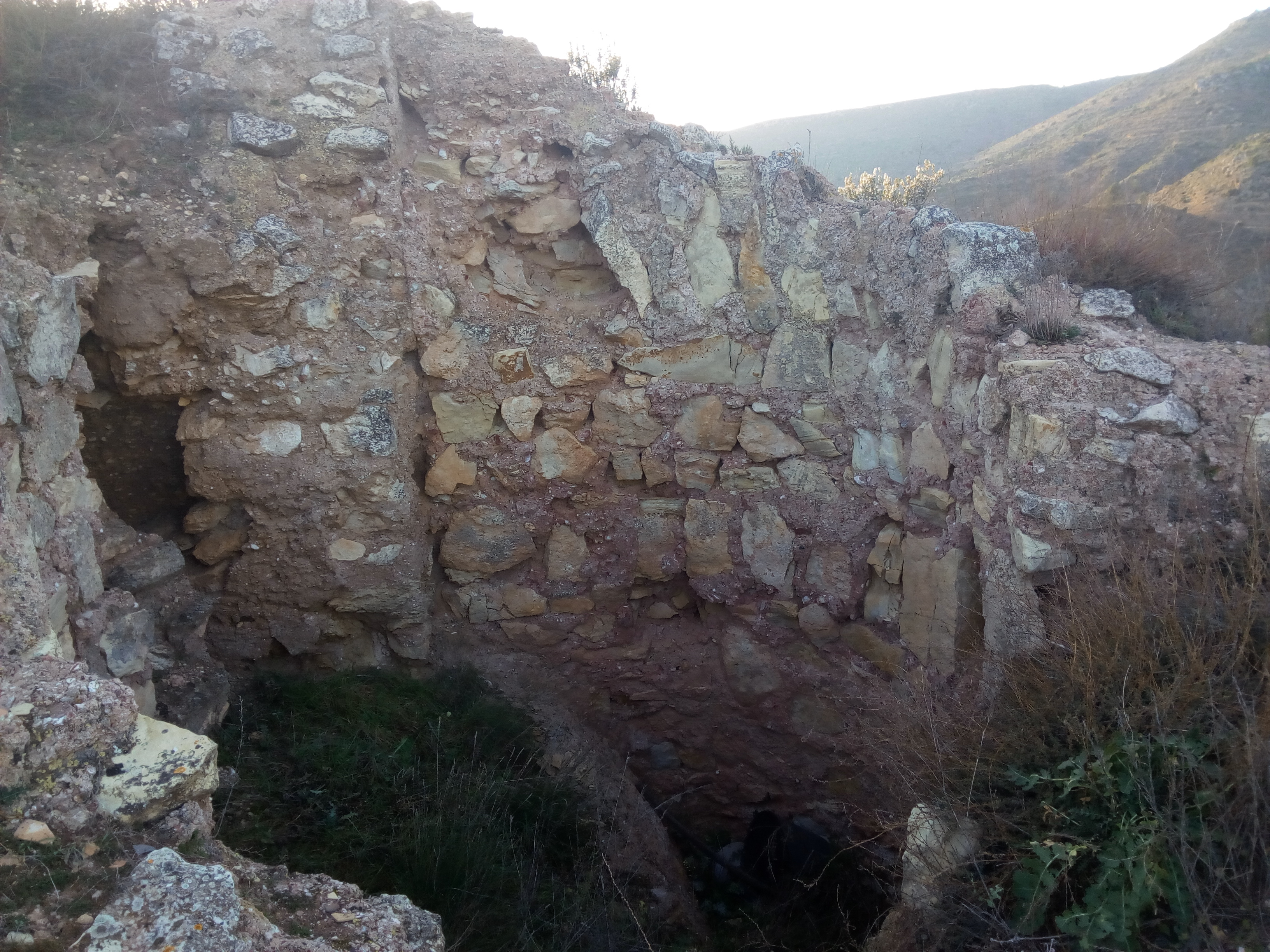 Vista de les restes de l'angle nordest del castell. Es poden vore un cantó de la muralla i el que pareix ser els murs d'una torre circular